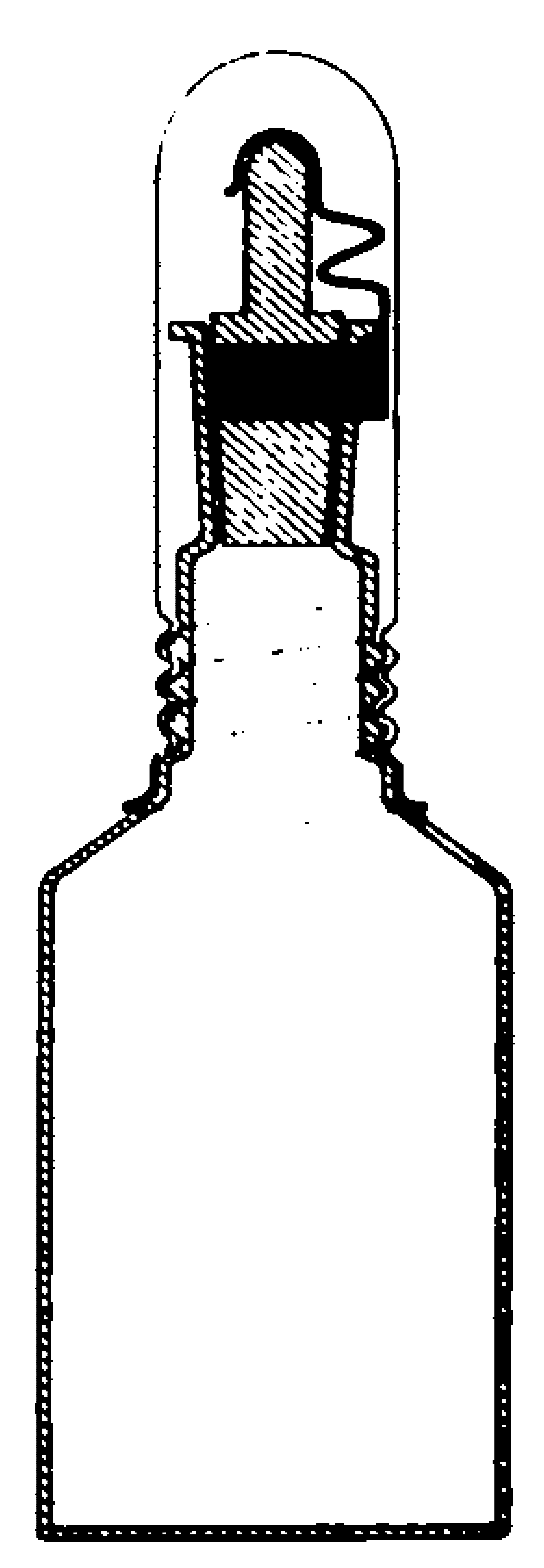 Fachartikel Sauerstoff-Flasche von Lajos Winkler